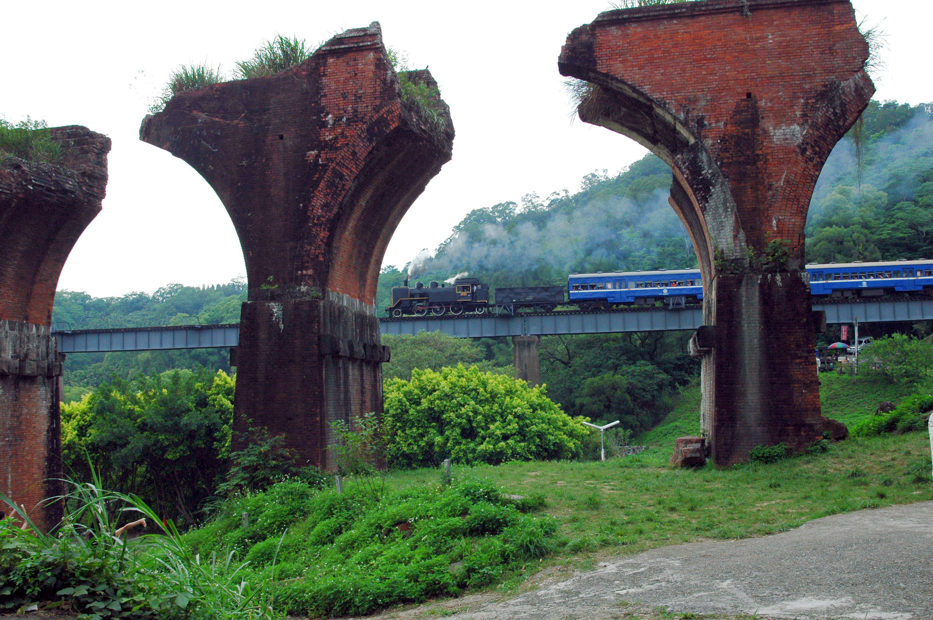 魚騰斷橋今名龍騰斷橋，是台灣百大地景之一，因其身上刻劃著421及921二次台灣大地震的傷痕，且又為鐵道建設中的極品遺跡，是著名的縣級古蹟。